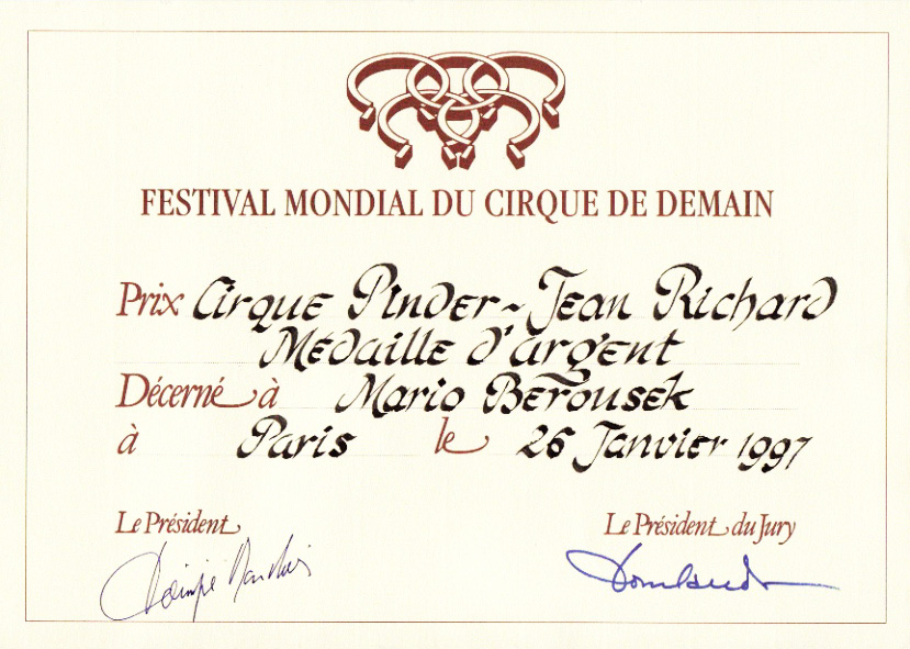 Festival_Mondial_du_Cirwue_de_Demain